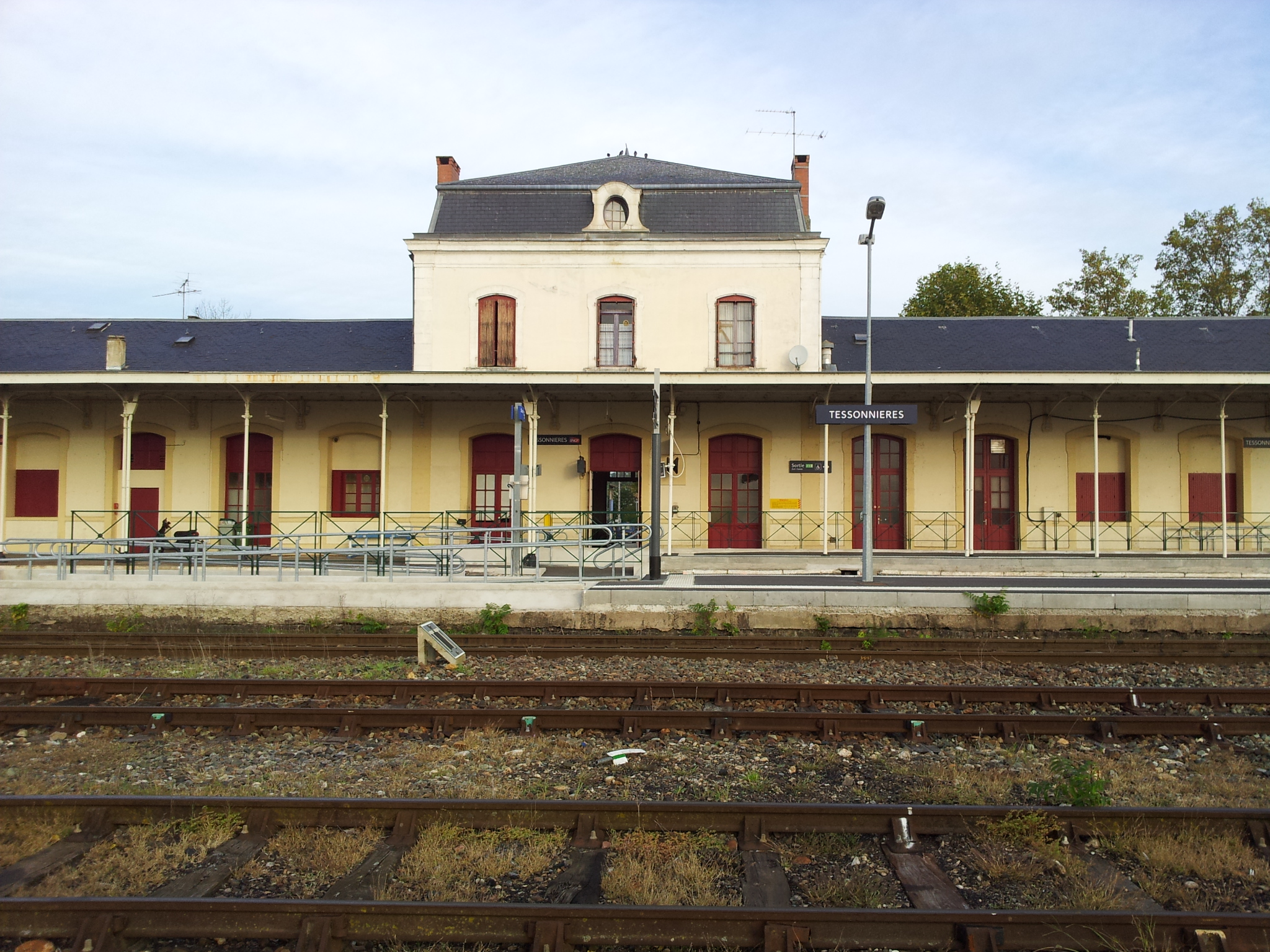 La gare de Tessonnières, dans le département du Tarn (France).